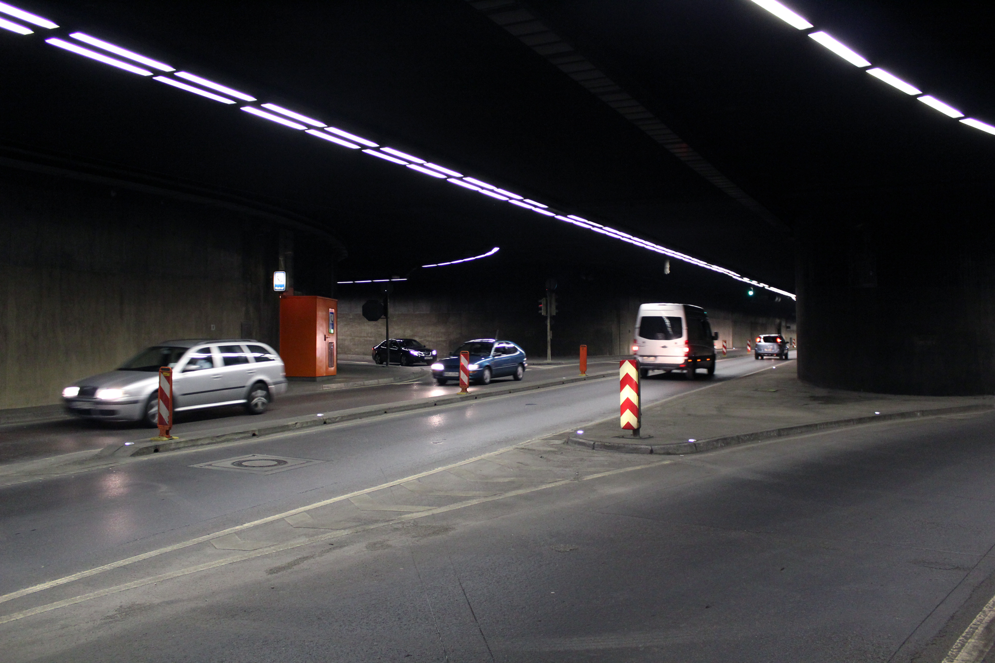 Heslacher Tunnel, Abzweigung zur Karl-Kloß-Straße